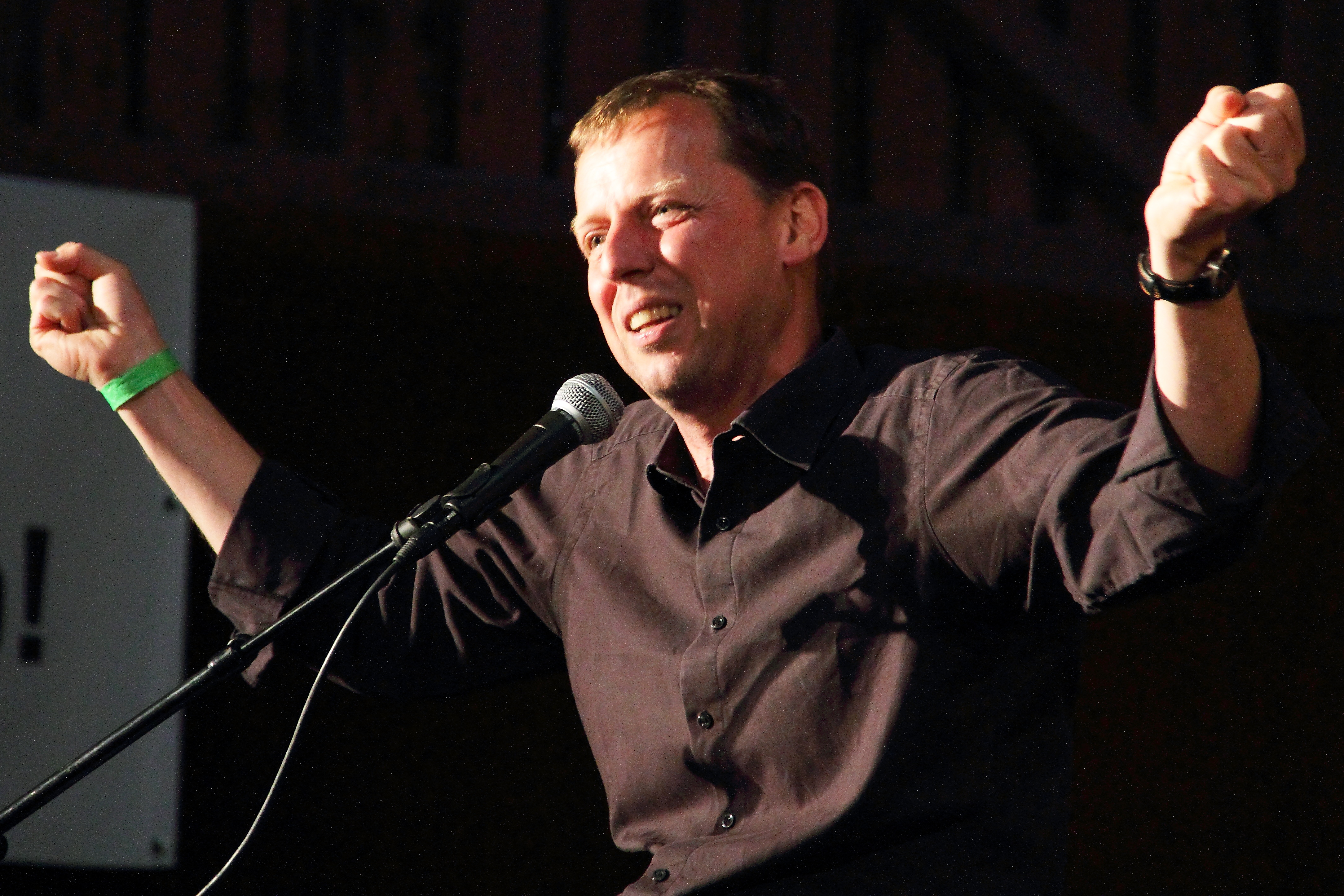 Die inklusive Jazzband Together & Vogl unter der Leitung von Gerald Endstrasser mit dem Kabarettisten Ingo Vogl auf dem INNtöne Jazzfestival 2017.